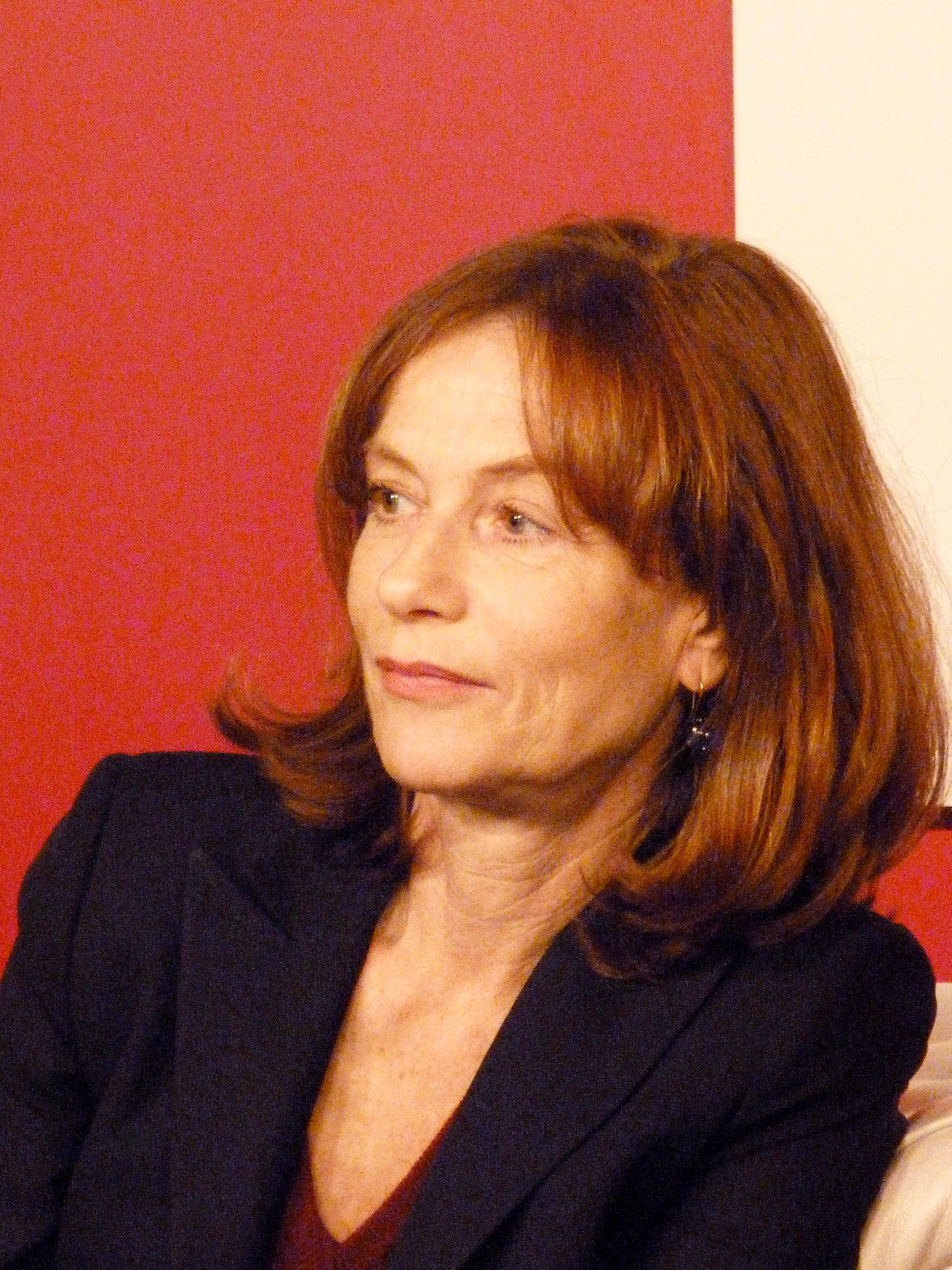 Isabelle Huppert, lors de la présentation du DVD du film Copacabana de Marc Fitoussi, le 27 novembre 2010 à la FNAC Montparnasse.